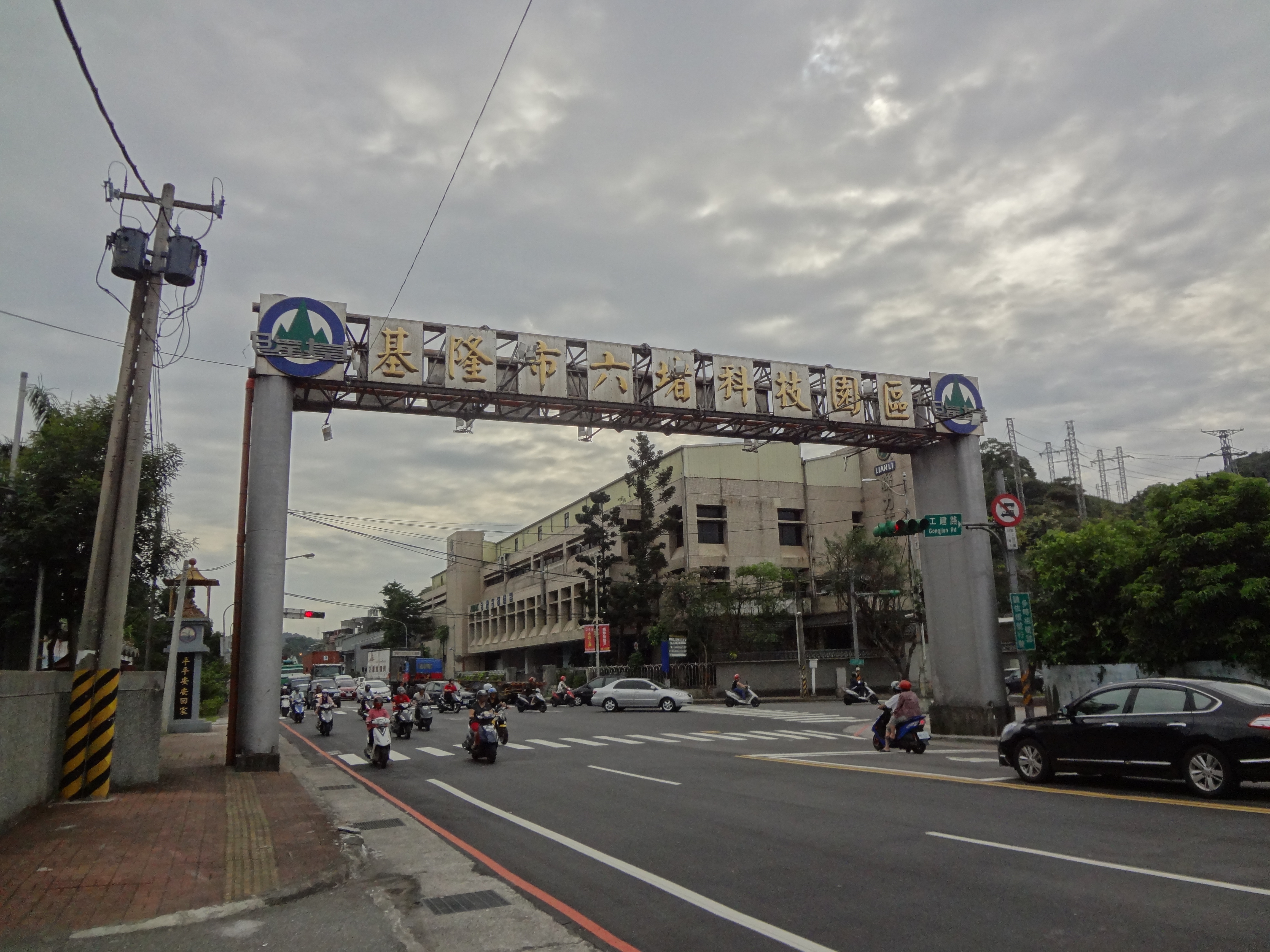 臺灣基隆市七堵區工建路與工建西路口，六堵科技園區入口。兩端掛基隆市市徽。